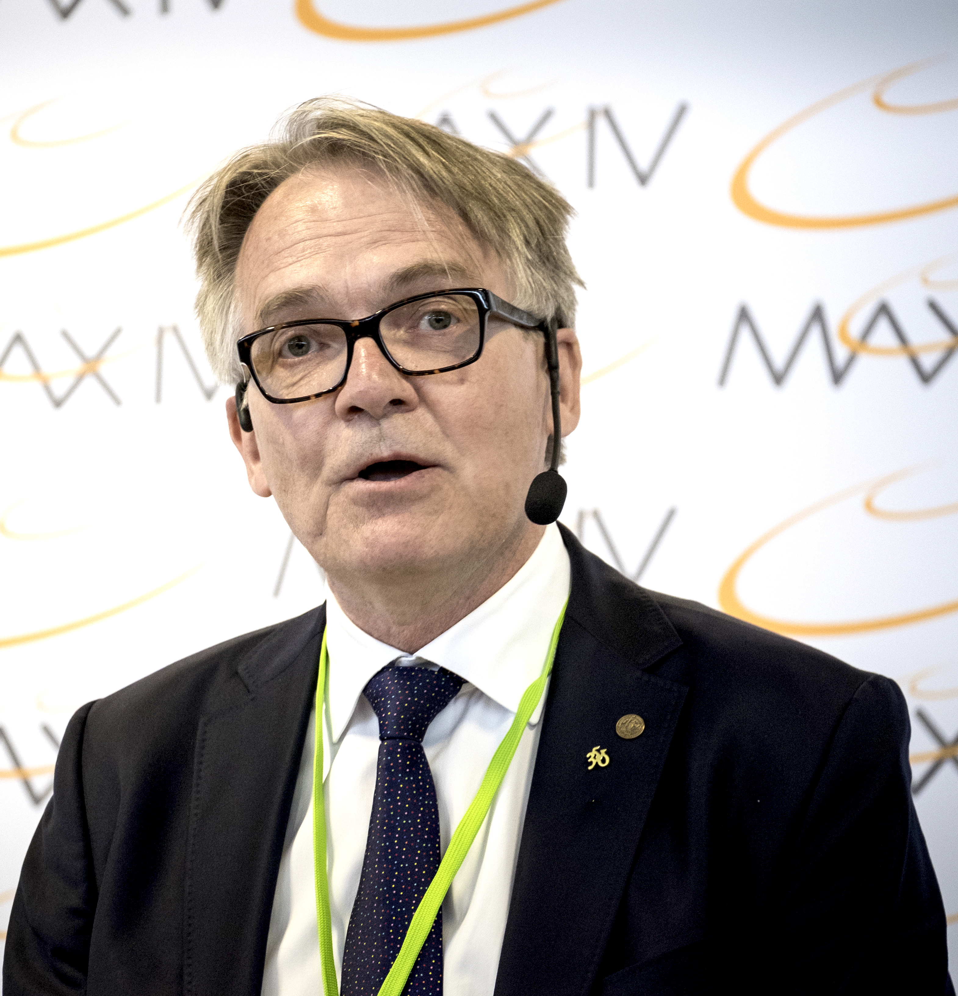 Lunds universitets rektor Torbjörn von Schantz talar vid invigningen av materialforskningsanläggningen Max IV i Lund 20160621..Photo: News Øresund - Johan Wessman..© News Øresund - Johan Wessman (CC BY 3.0).. .Detta verk av News Øresund är licensierat under en Creative Commons Erkännande 3.0 Unported-licens (CC BY 3.0). Bilden får fritt publiceras under förutsättning att källa anges. .The picture can be used freely under the prerequisite that the source is given. News Øresund, Malmö, Sweden.News Øresund är en oberoende regional nyhetsbyrå som är en del av det oberoende dansk-svenska kunskapscentrat Øresundsinstituttet...